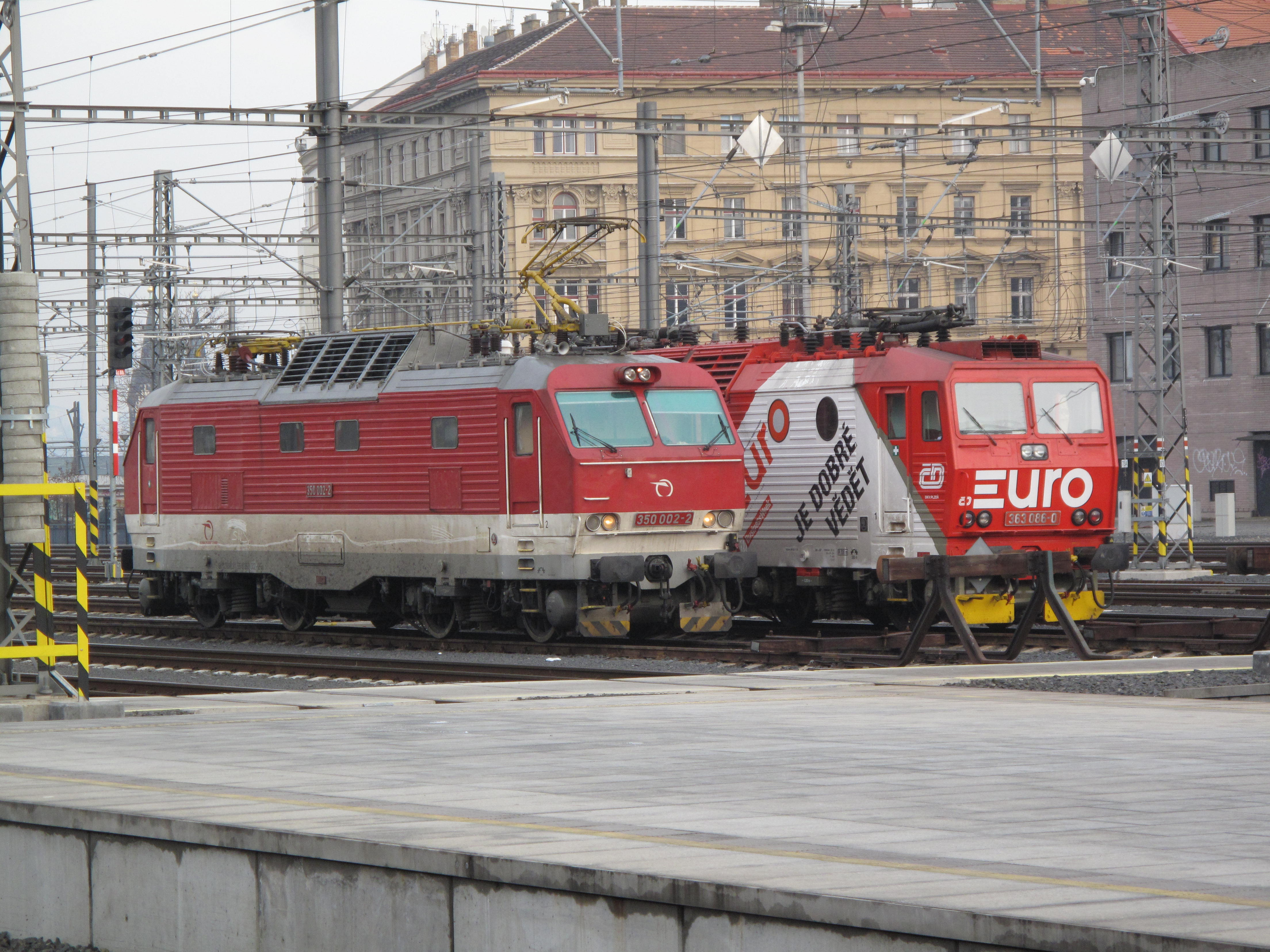 Lokomotivy na Hlaváku v Praze